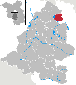 Rangsdorf in Brandenburg (Country) - District Teltow-Fläming